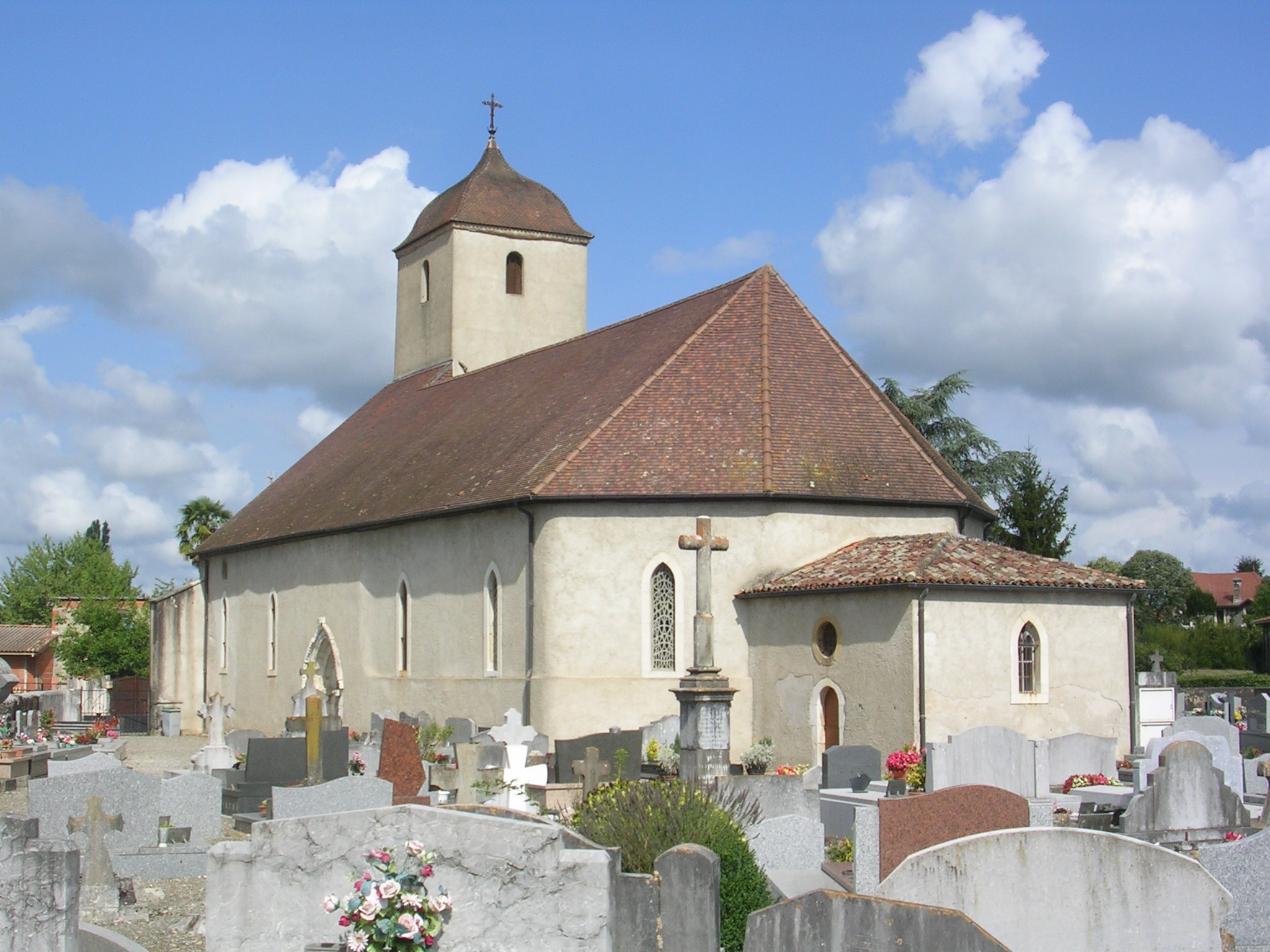 Eglise de Bellocq, dans le département français des Pyrénées-Atlantqiues